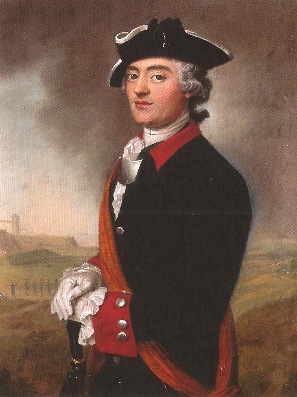 Karl Emanuel Stürler (1738-1827), Leutnant in holländischen Diensten (bis 1776), Gutsbesitzer in Ursellen, CC 1775/1803, Schultheiss von Thun 1781, des kleinen Rats 1795/1814.